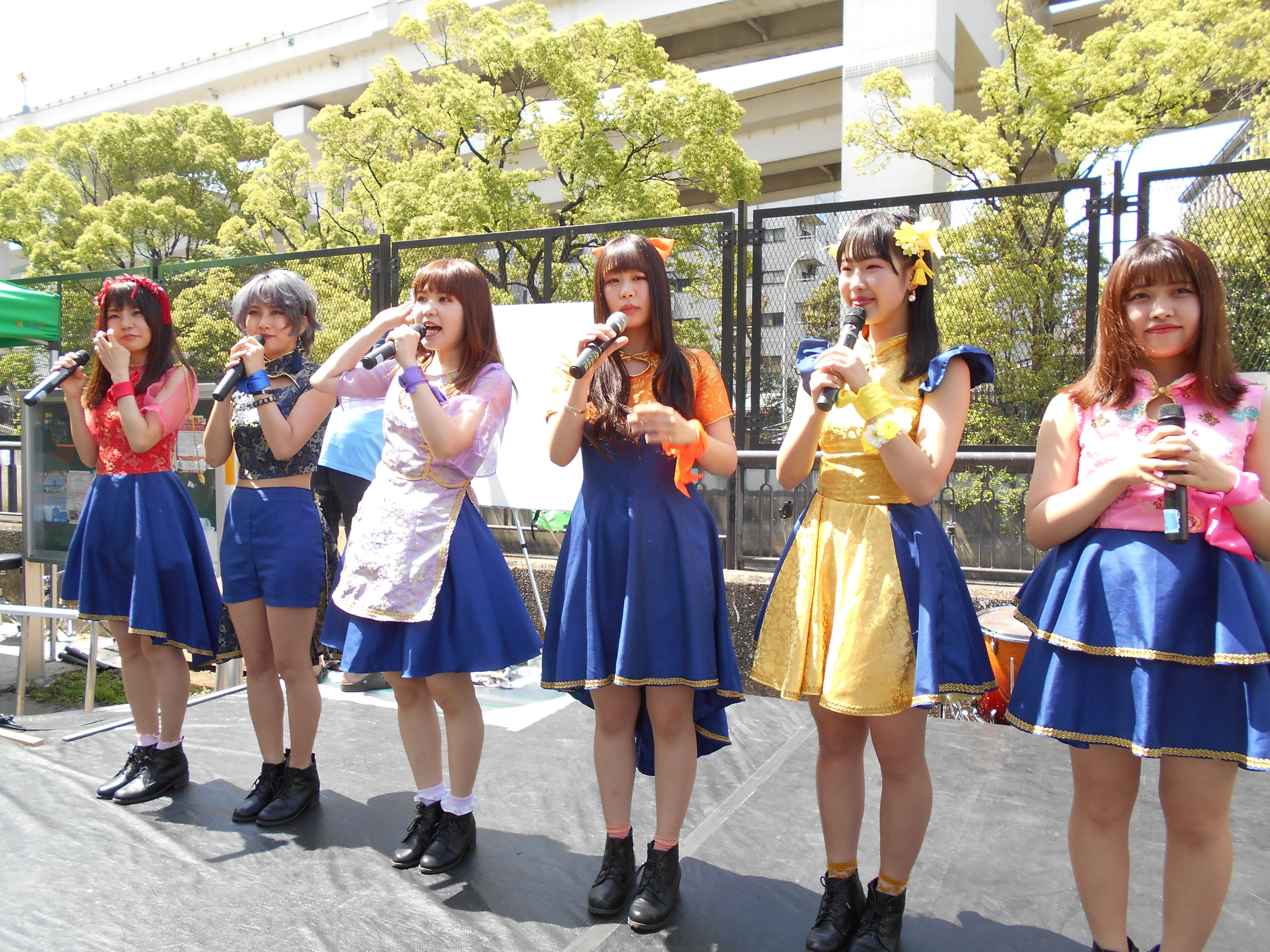 石川町裏フェス2019（2019年5月19日撮影）